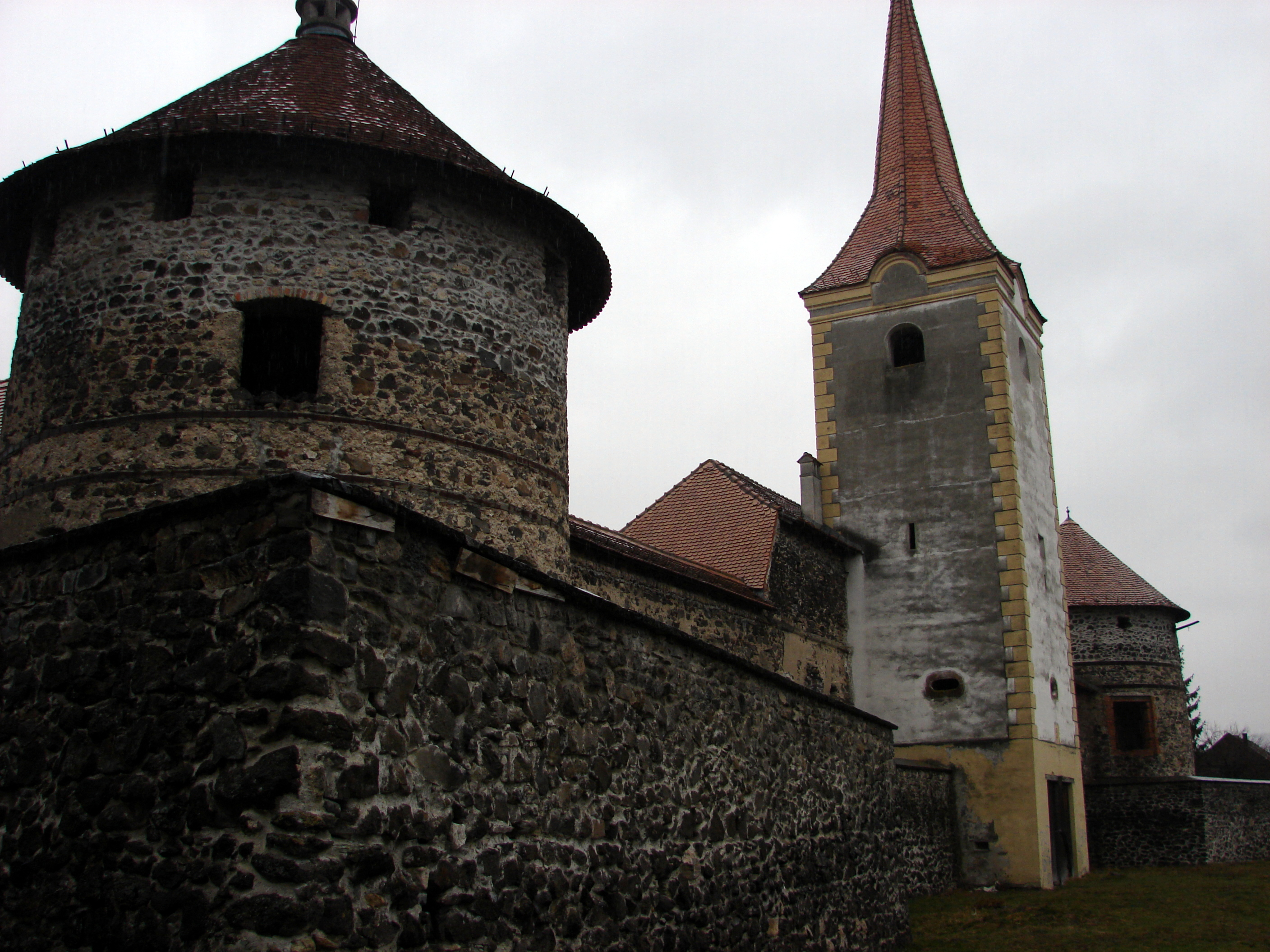 Ansamblul castelului Sükösd-Bethlen